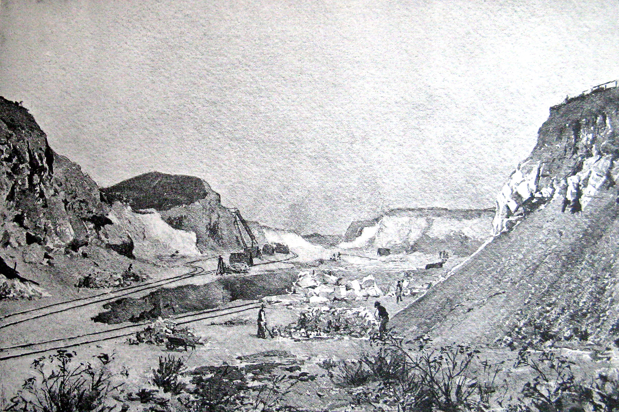 Faxe Kalkbrud i slutningen af 1800-tallet